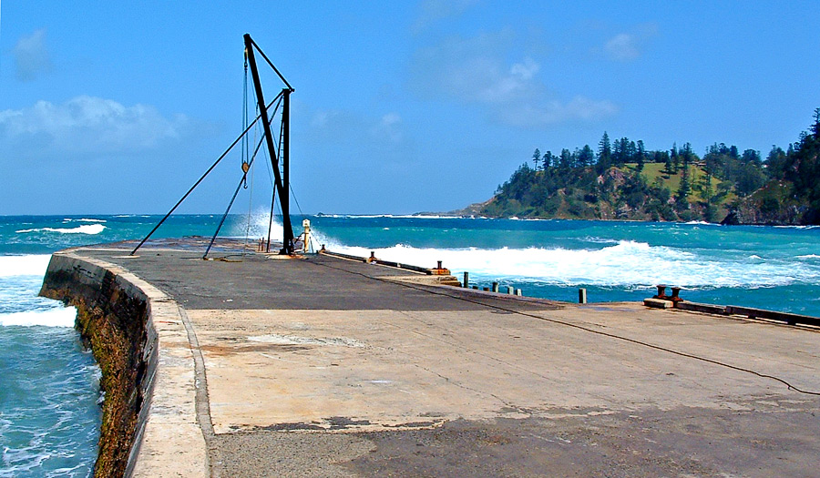 Jetty at Kingston, Norfolk Island.